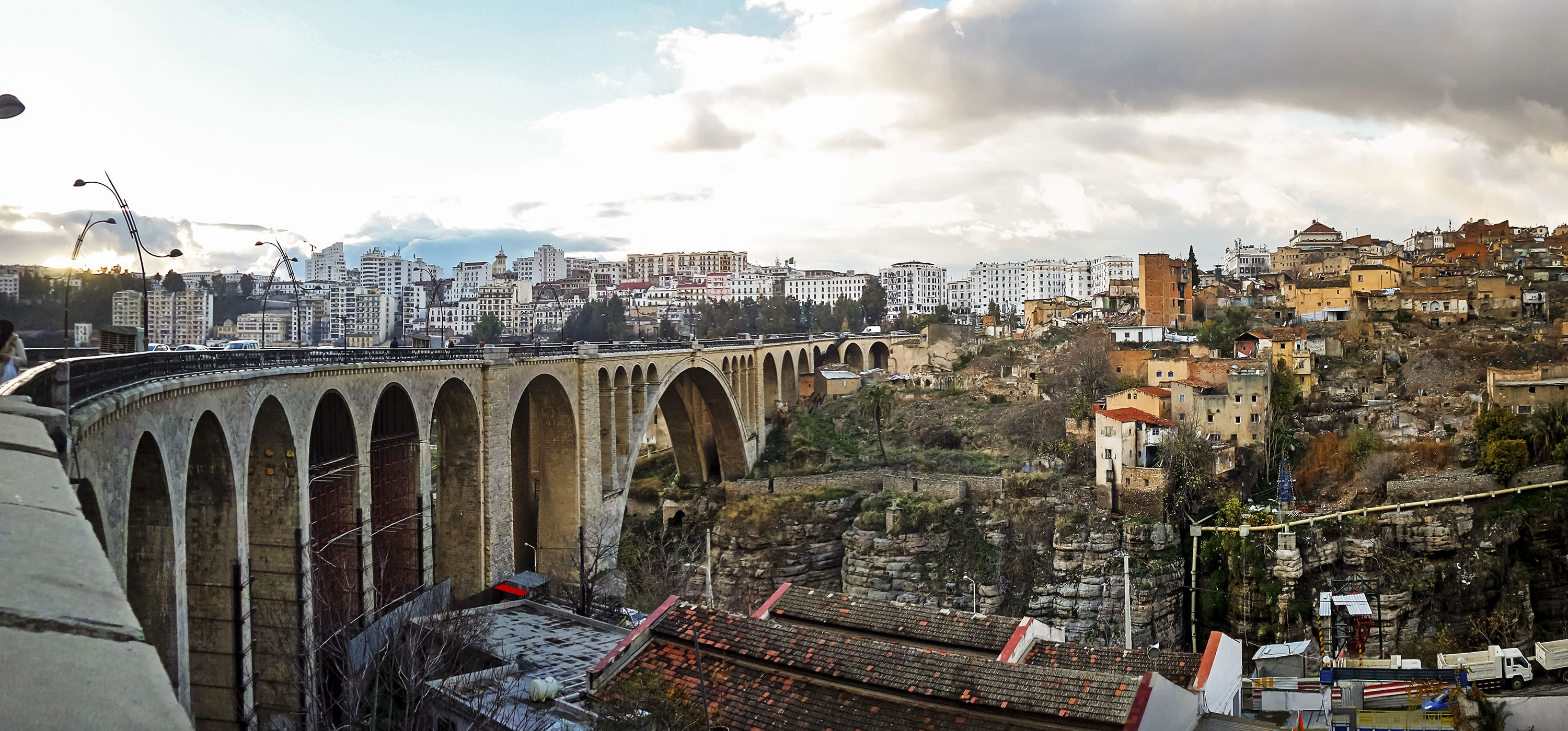 Ville de Constantine مدينة قسنطينة Wilaya de Constantine ولاية قسنطينة